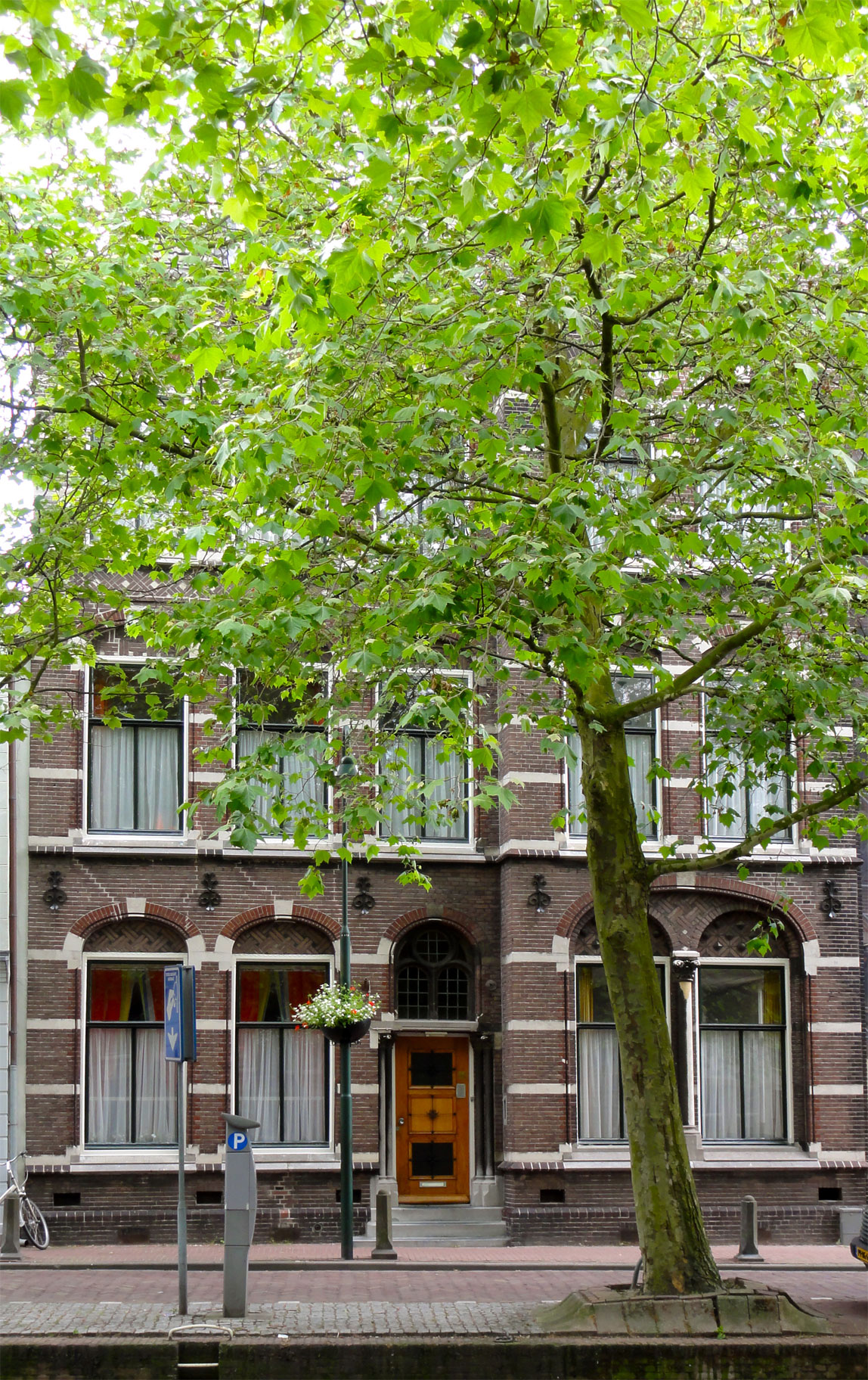 Hoge Gouwe 39 Gouda, rijksmonument